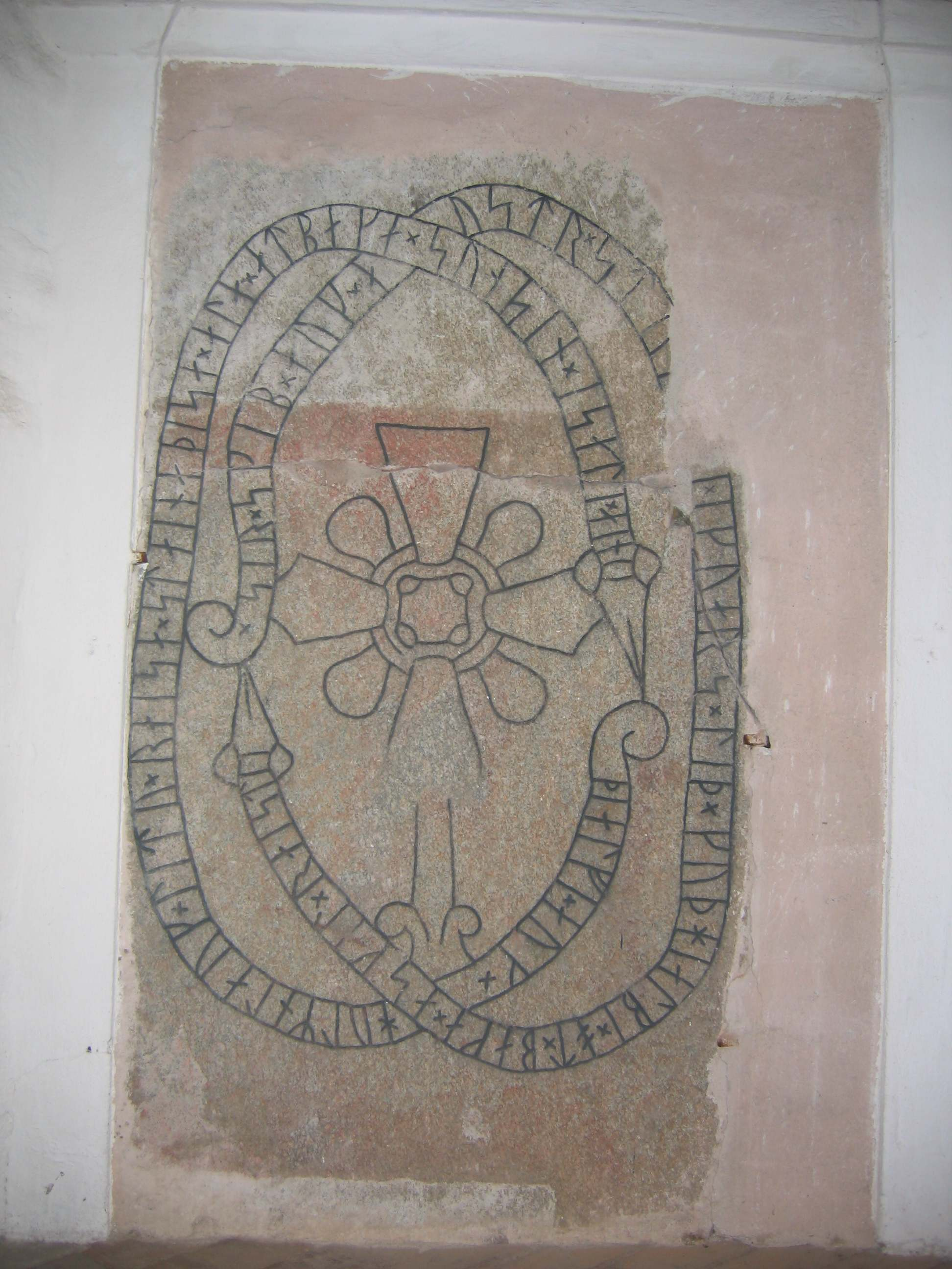 Runestone U778